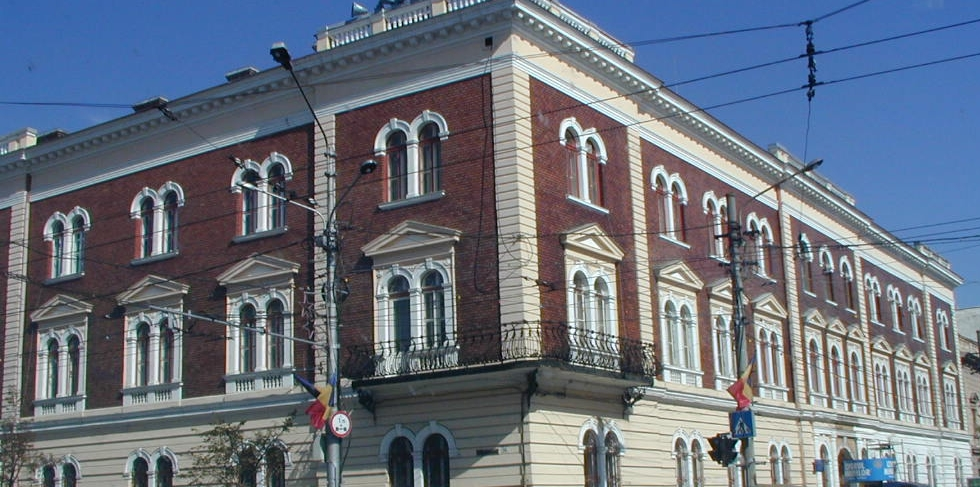 Palatul de Finanţe din Cluj-Napoca - Palace Finance in Cluj-Napoca